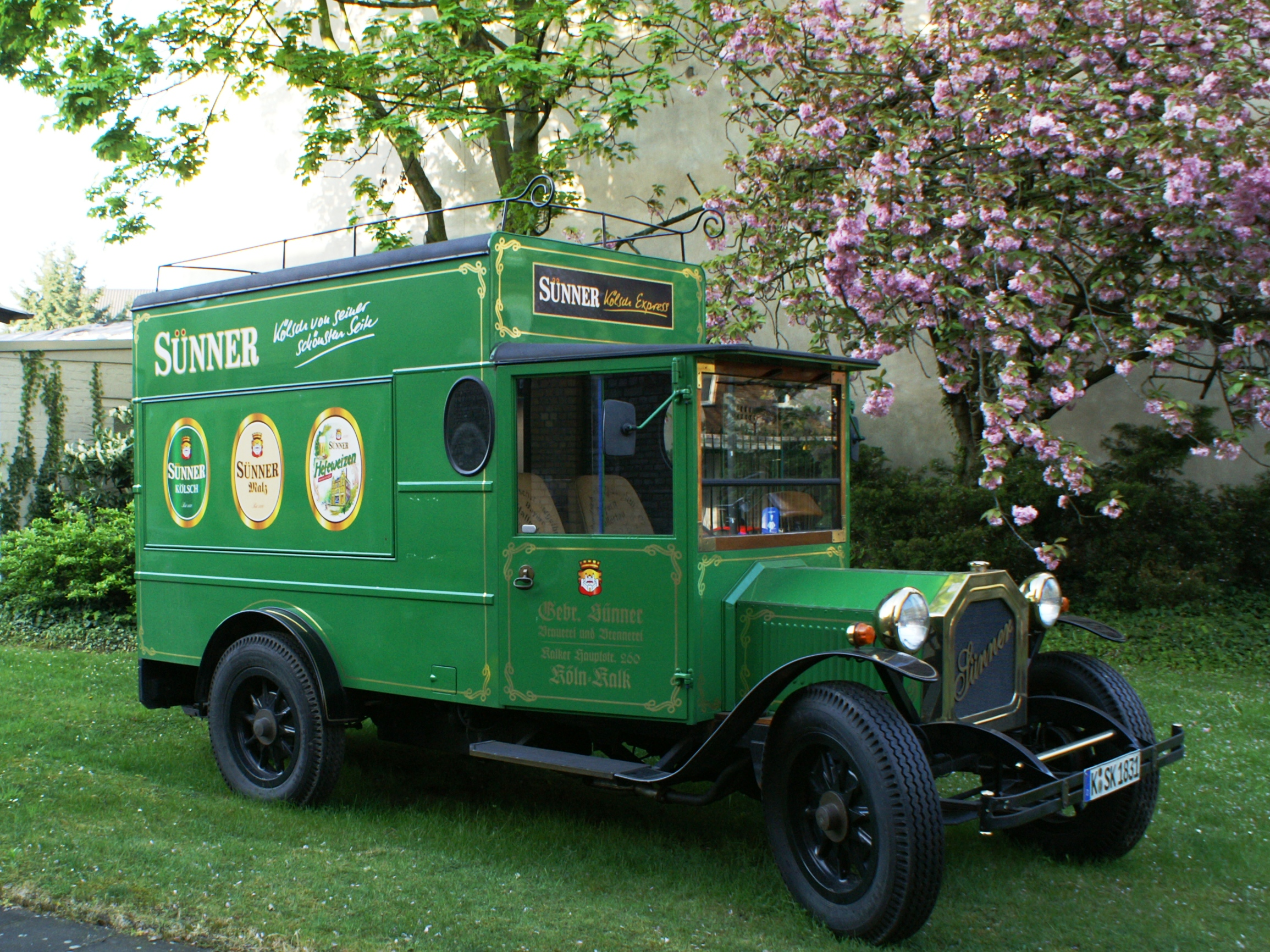 Kölschexpress von Sünner